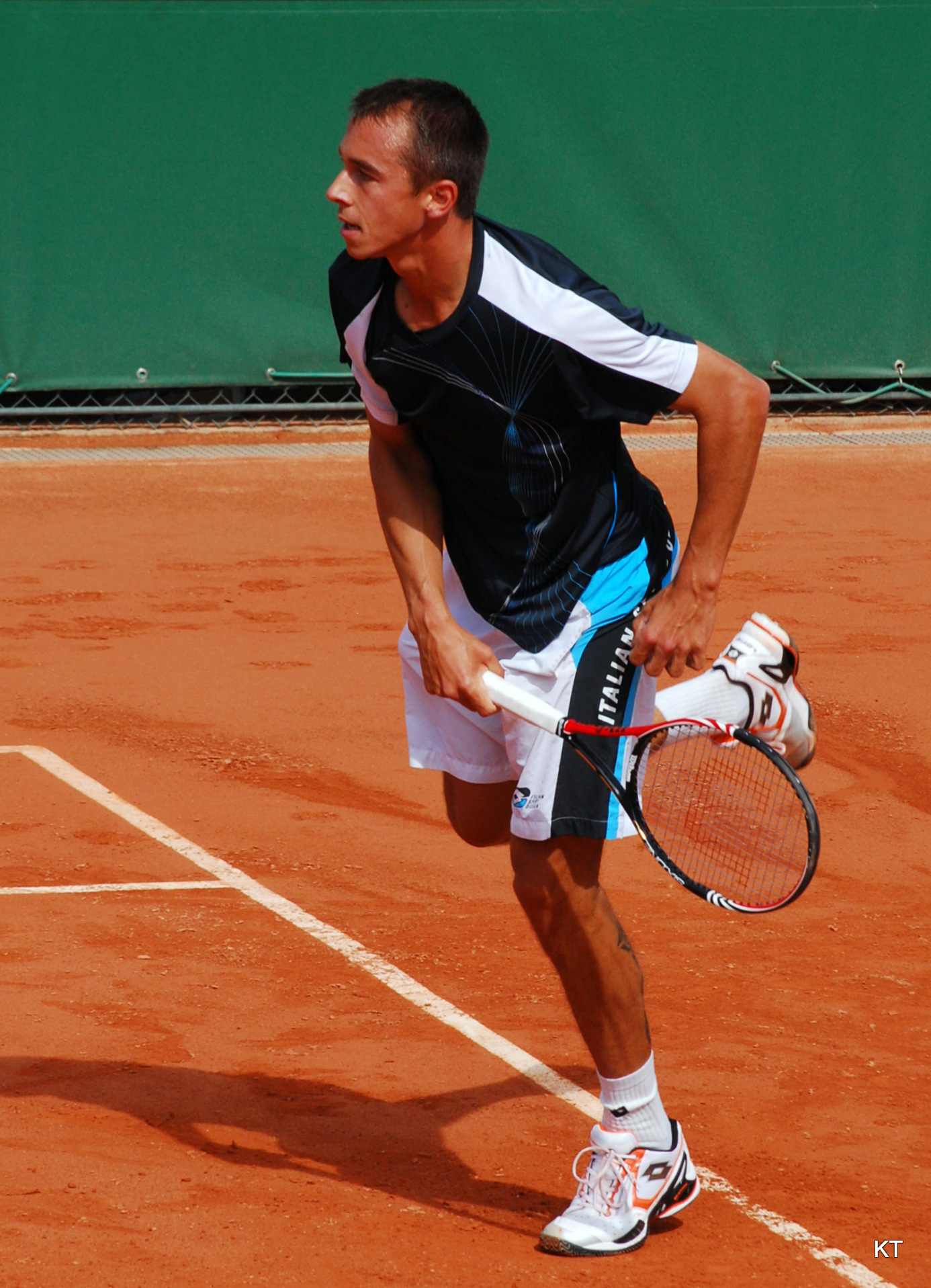 Roland Garros 2011.